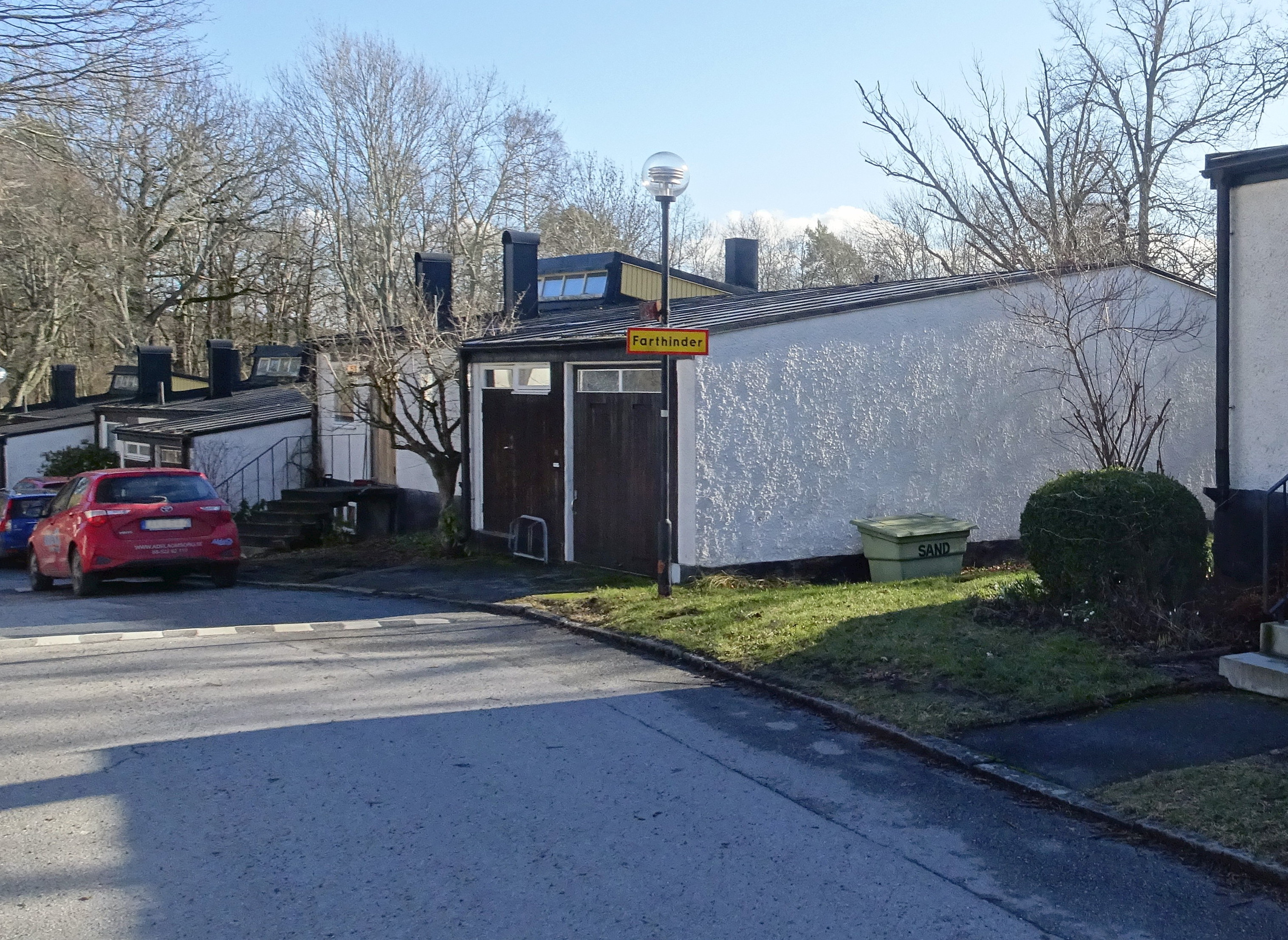 Radhusområdet Sjöträdgården, Hässelby strand, byggår 1957-1958 Alf Bydén (Arkitekt) Bostadsrättsföreningen Sjöträdgården (Byggherre) Bo Stigwall (Byggmästare) Dag Åberg (Arkitekt) Eric Anjou (Trädgårdsarkitekt)